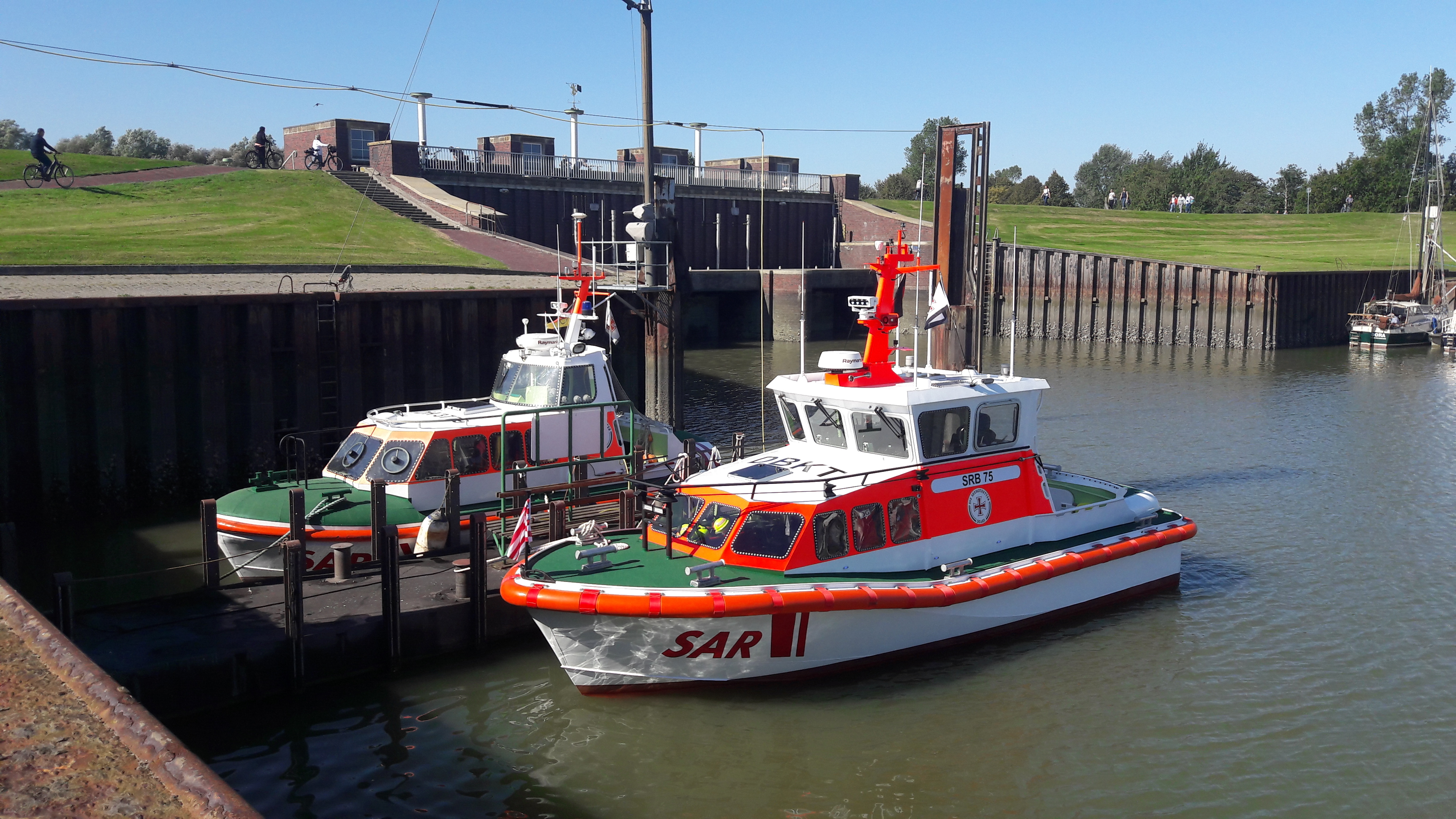 SRB 75 zusammen mit seinem Vorgänger, dem SRB Baltrum im Hafen von Horumersiel.